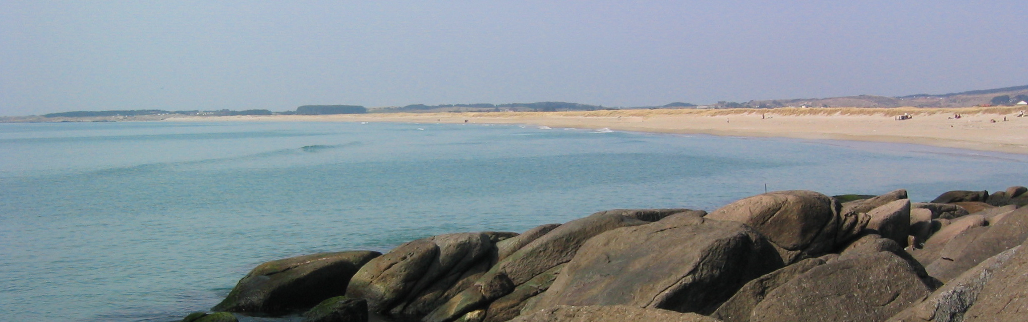 Sandstrand på Brusand, Hå komune på Jæren